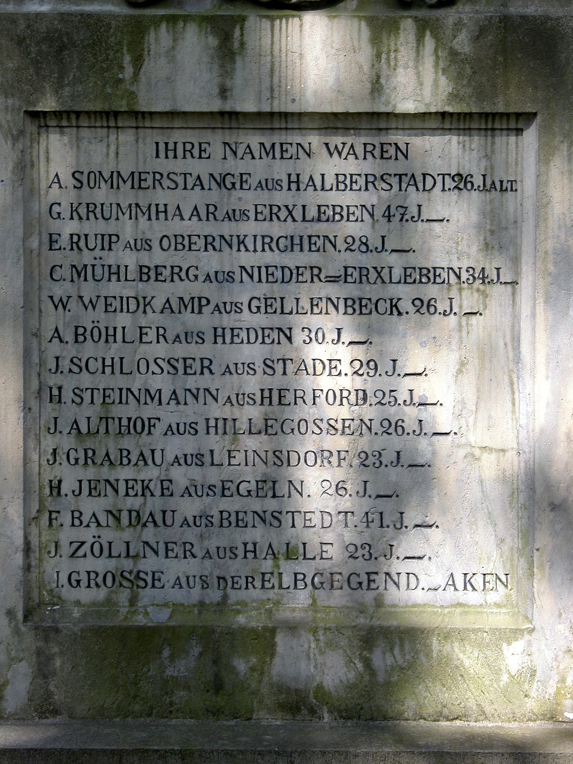 Braunschweig: Schill-Denkmal, Detail (Liste). Brunswick, Germany: Detail of the Schill-Monument (list).